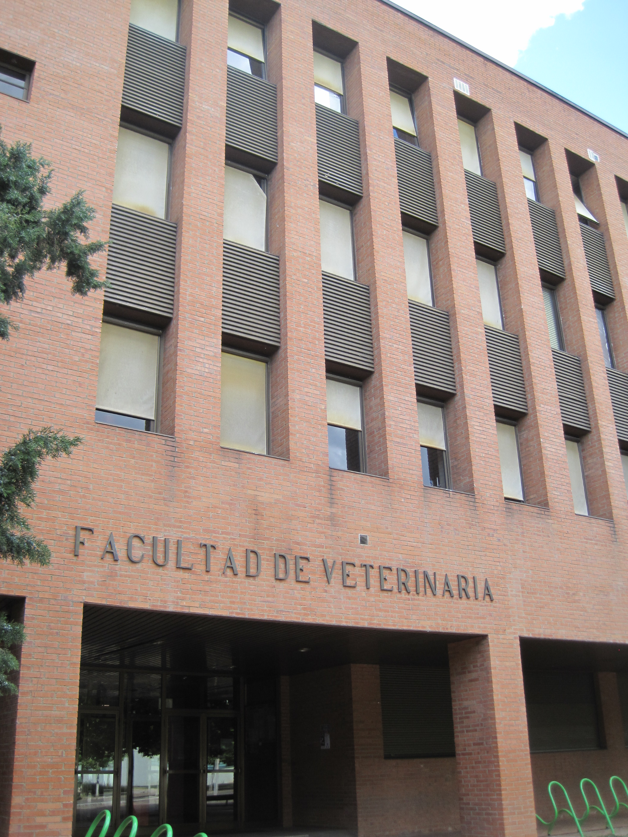 Facultad de Veterinaria. Universidad de León (España).